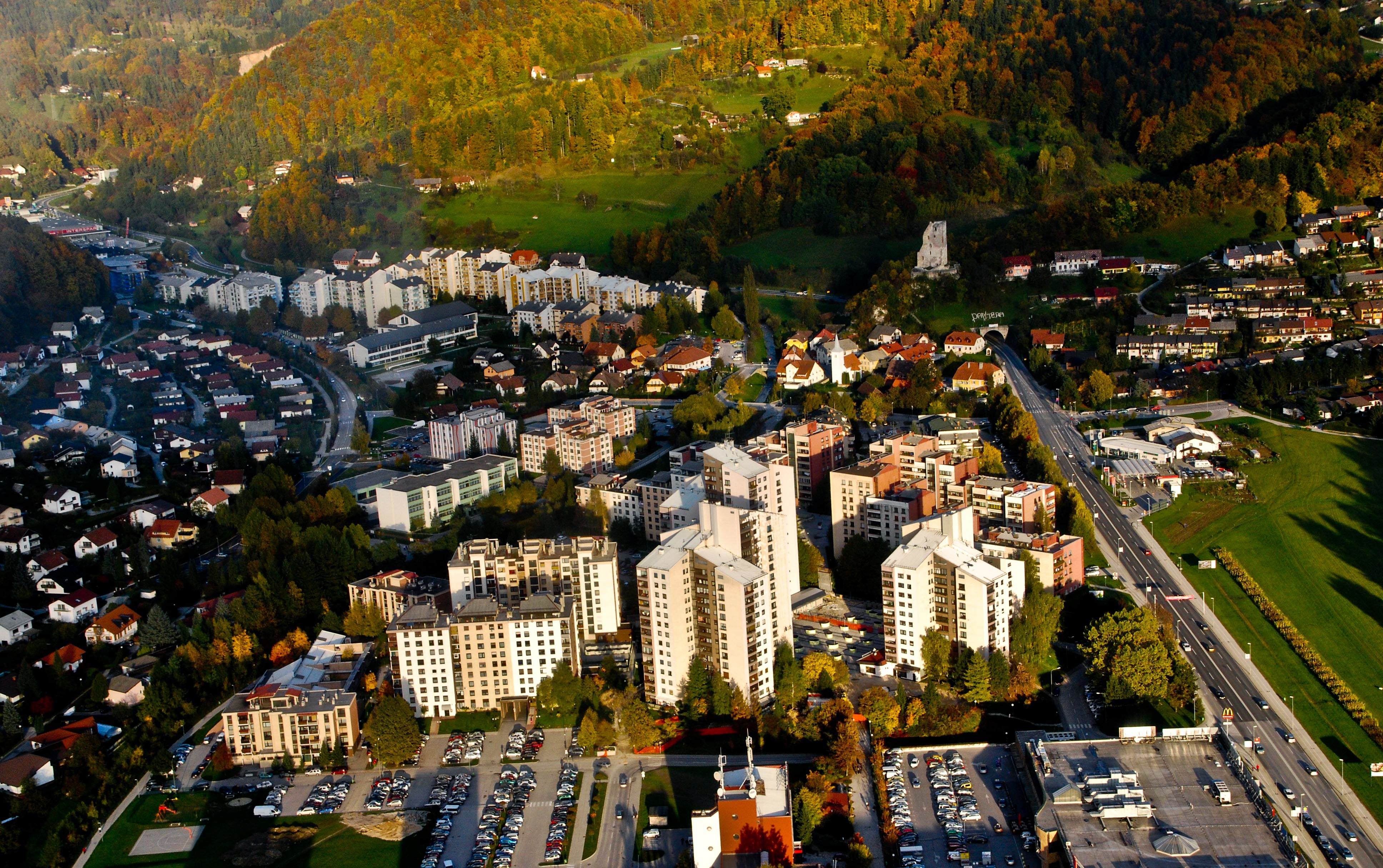 Panorama Velenja.